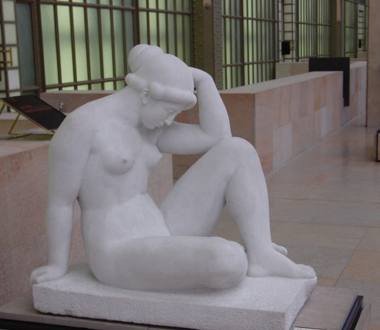 Maillol, Aristide (1861-1944) La Mediterranee (de 1905 a 1923) Paris, Musee D'Orsay